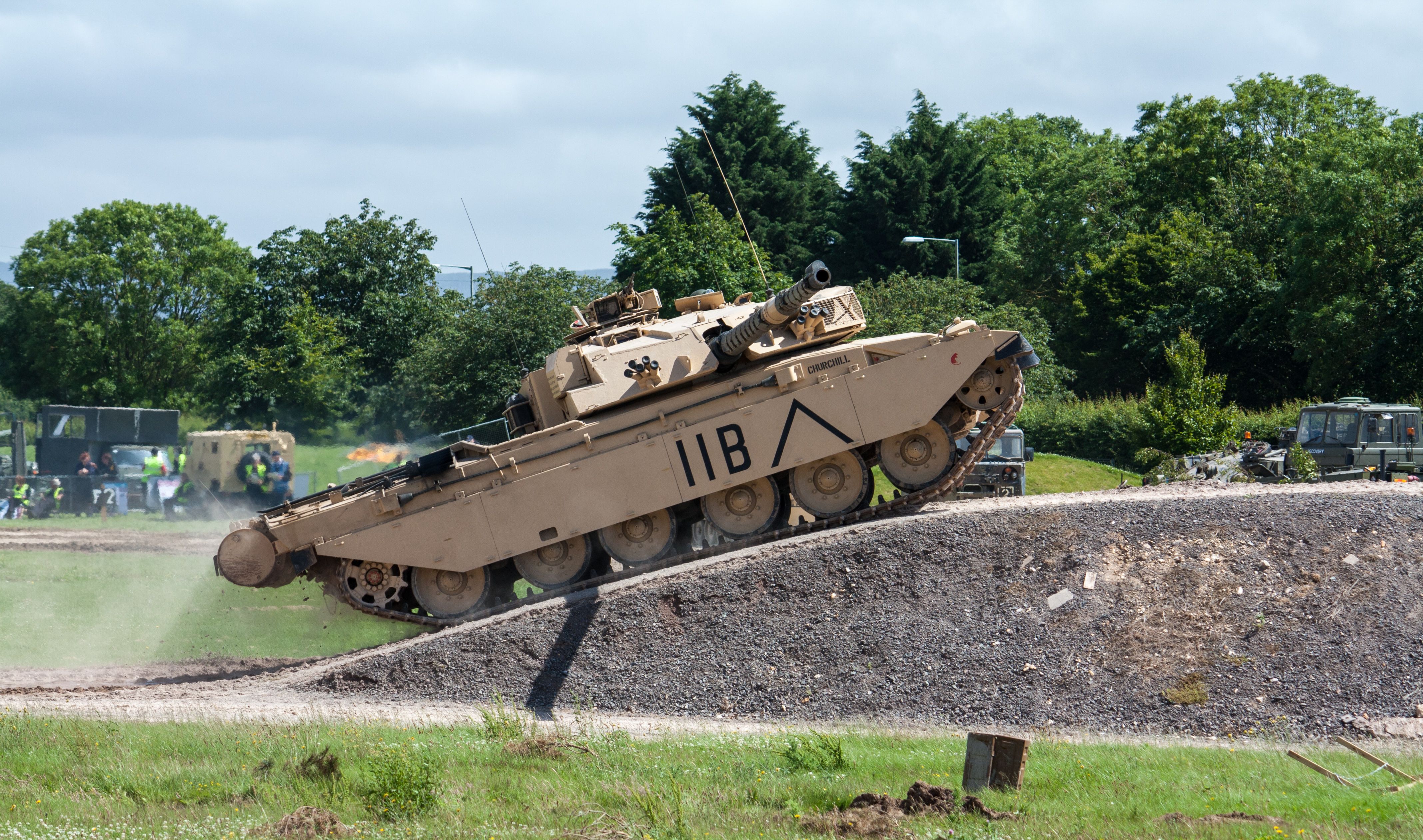 Challenger 1MBT Mk 3